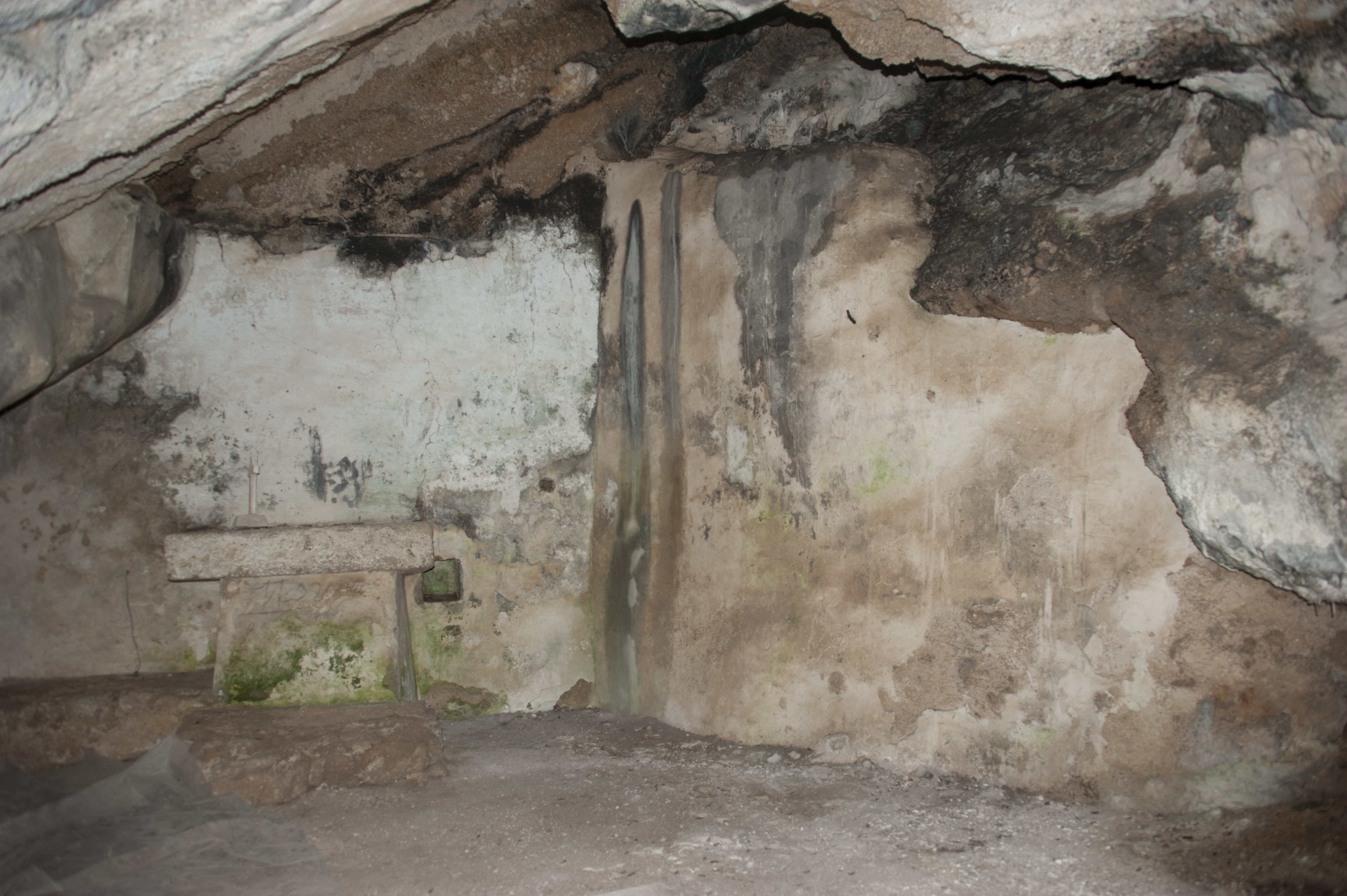 L’eremo di San Michele Arcangelo conserva tre profonde grotte, una delle quali fu in epoca remota adattata ad oratorio, e una cappella, è l’unico romitorio femminile del Monteluco.